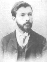 Hein Willems Heinsius